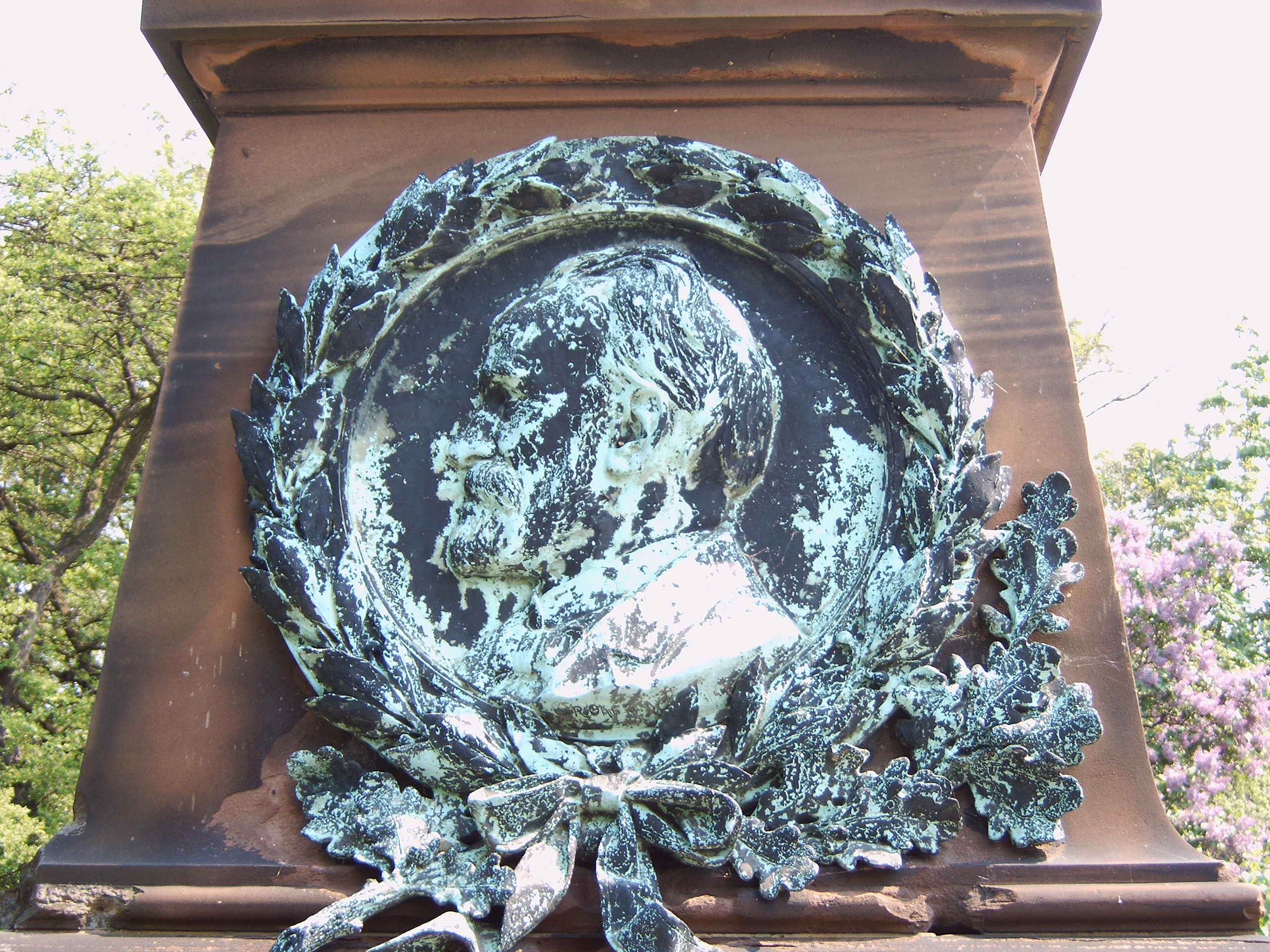 Bildnis von Theodor Kozlowski am Kozlowskidenkmal in Magdeburg, entstanden 1900